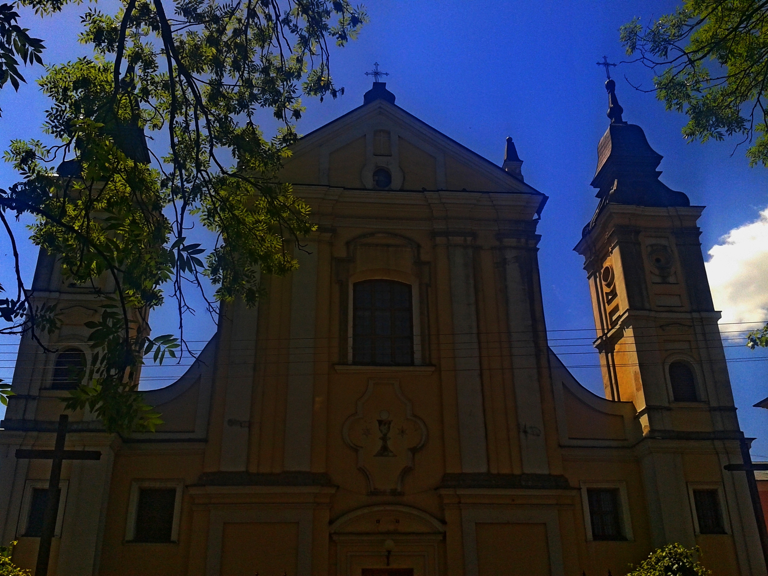 Katedra w Janowie Podlaskim